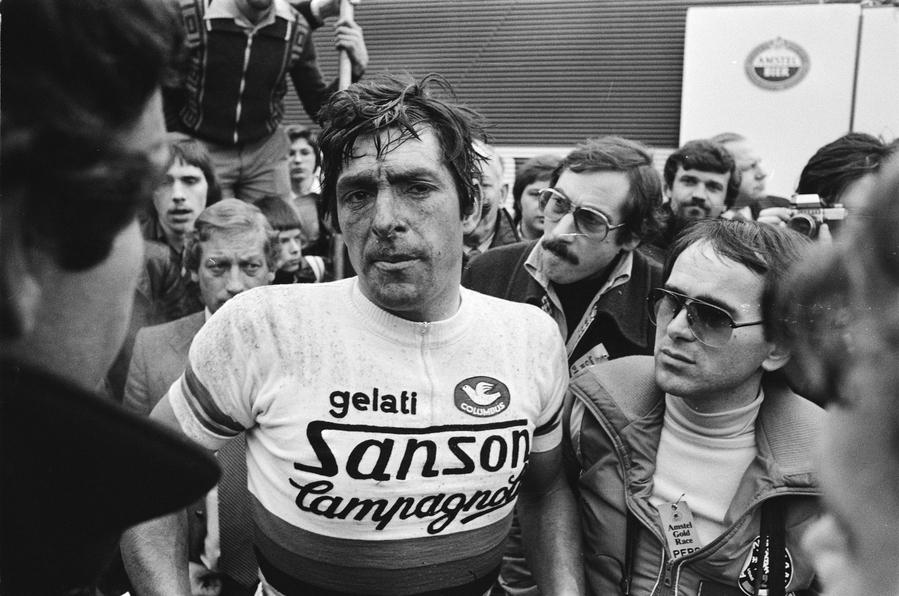 Amstel Gold Race wielrennen. Renner Francesco Moser (de wereldkampioen van 1977).